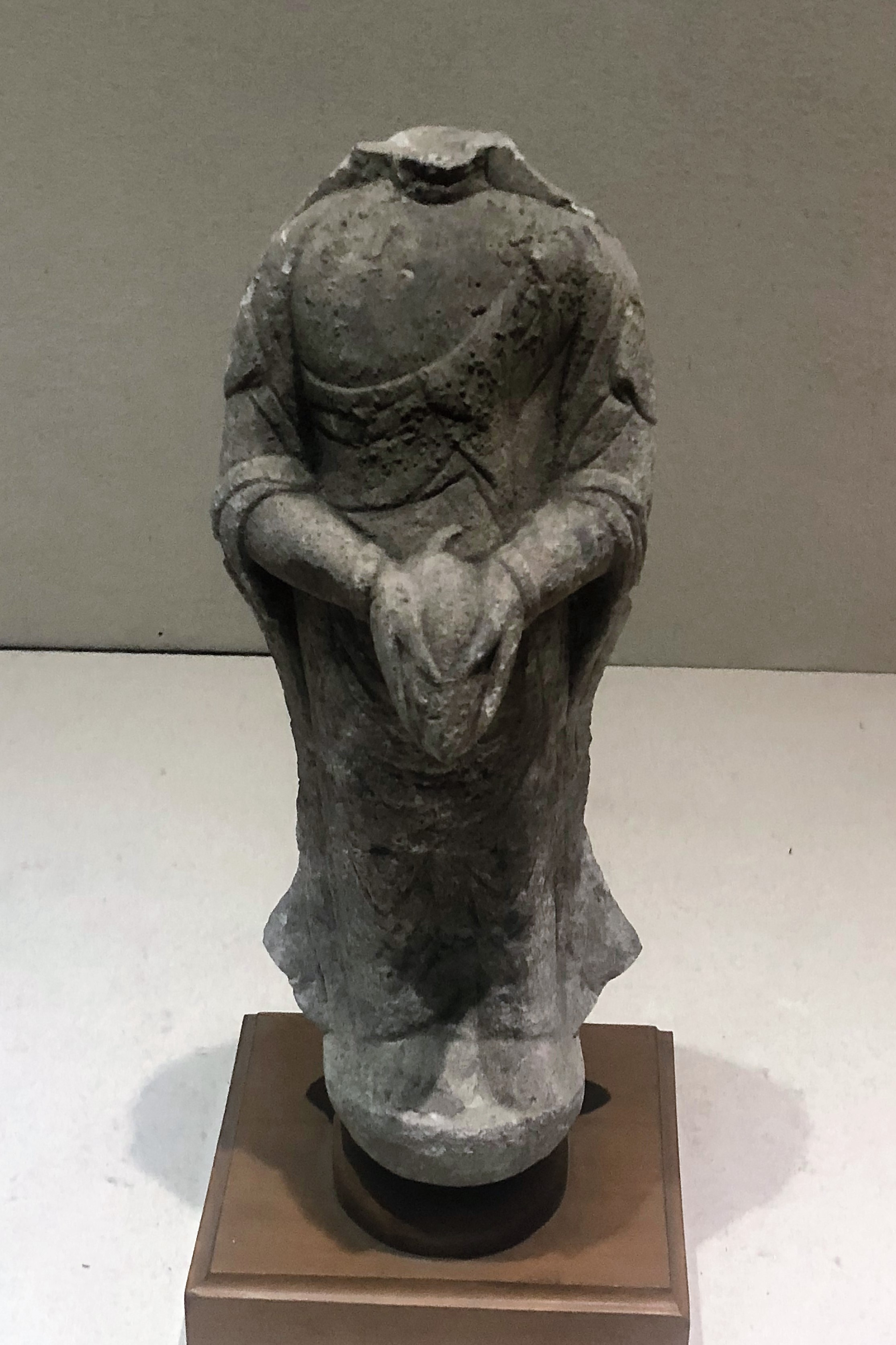 中文（中国大陆）: 陀罗尼经经幢石造像 唐 1962年修缮经幢时在其附近地下发现